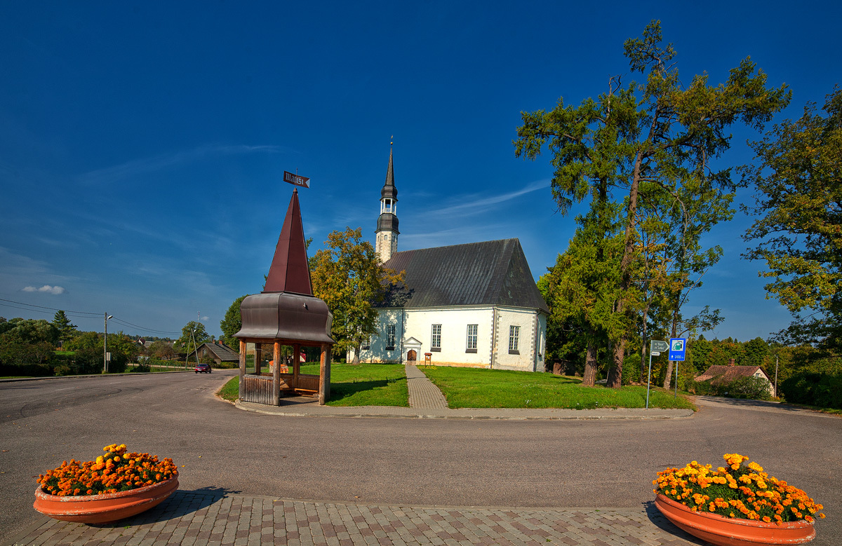 Matīšu luterāņu baznīca, Matīši